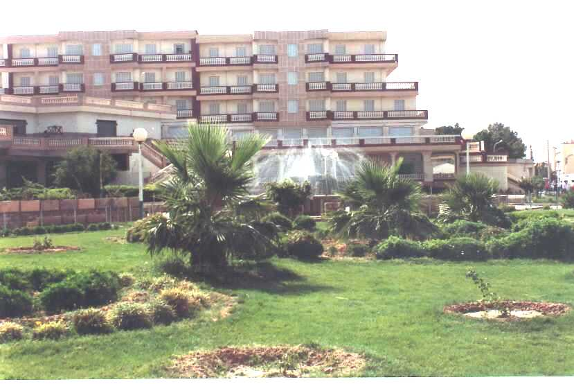 صورة لولاية المسيلة